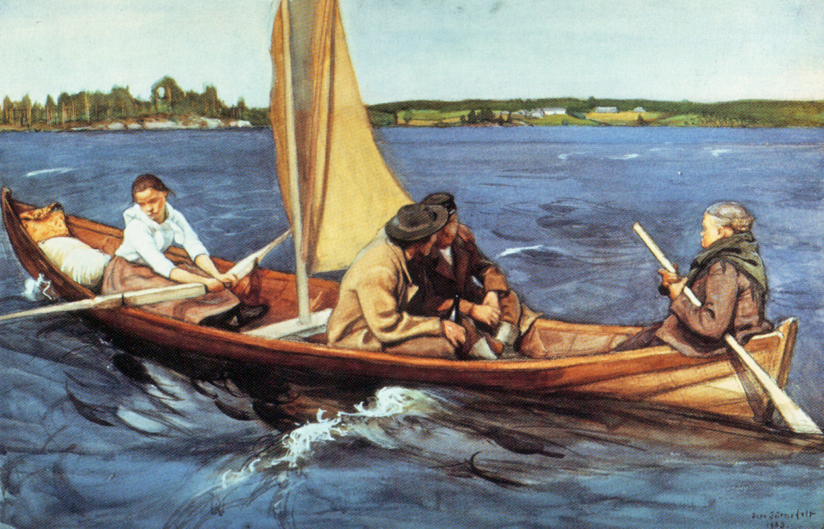 Kotimatkalla